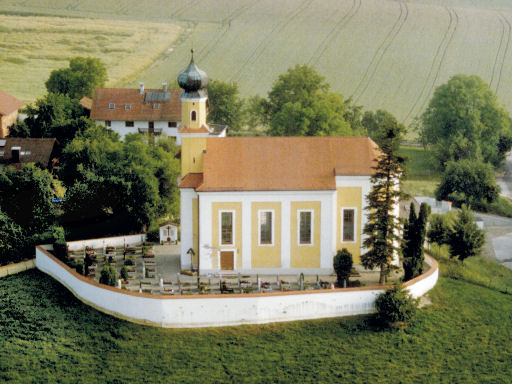 Kirche St. Peter und Paul in Zangberg, Ortsteil Palmberg